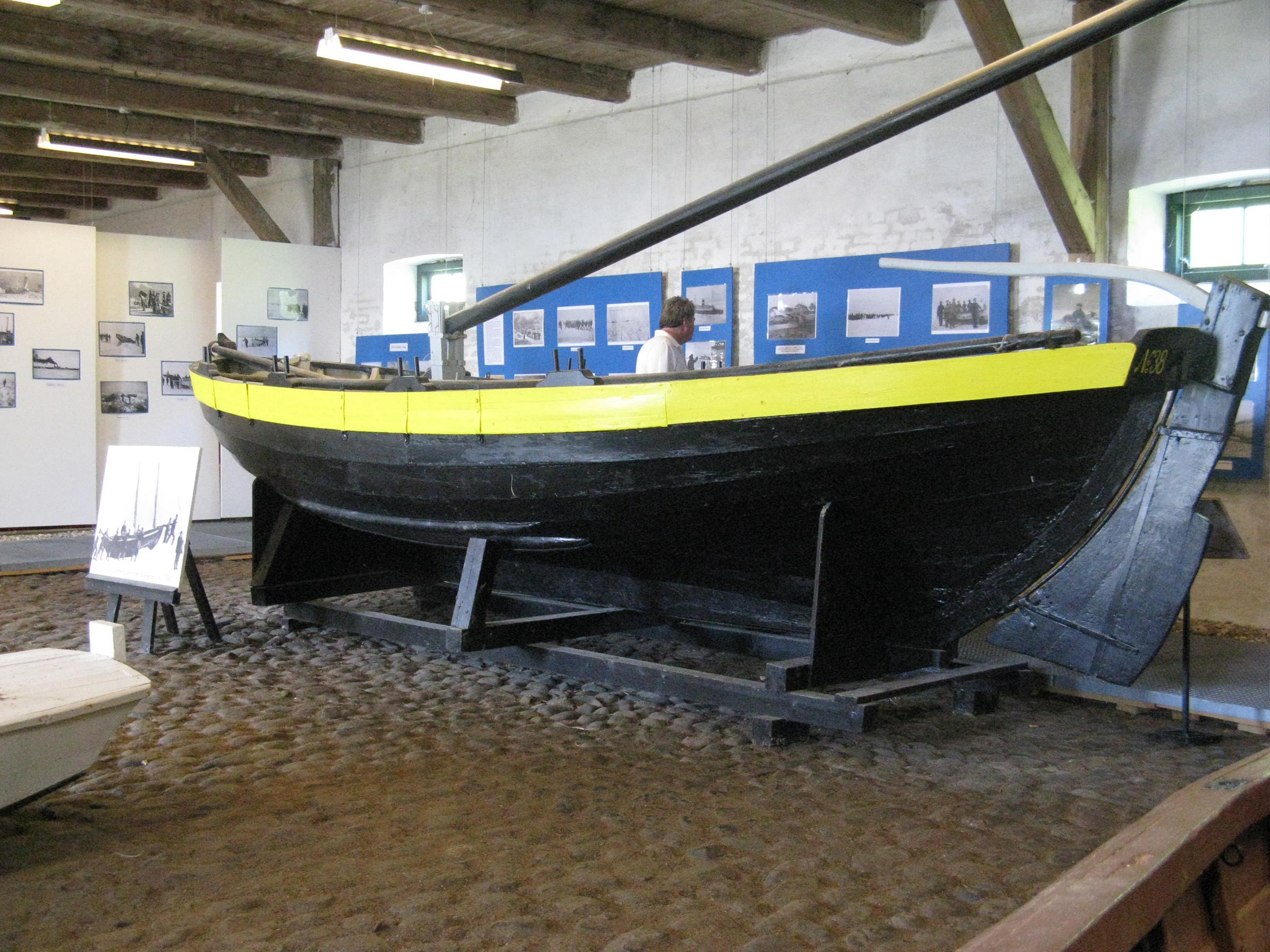 Isbåd på Museet i Halskov